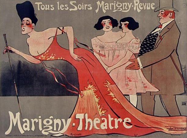 Tous les soirs Marigny-Revue. Marigny théâtre, Razinski, Lise Fleuron, Dji, Régiane. Affiche de Maurice Lourdey. Imprim. Louis Geisler.